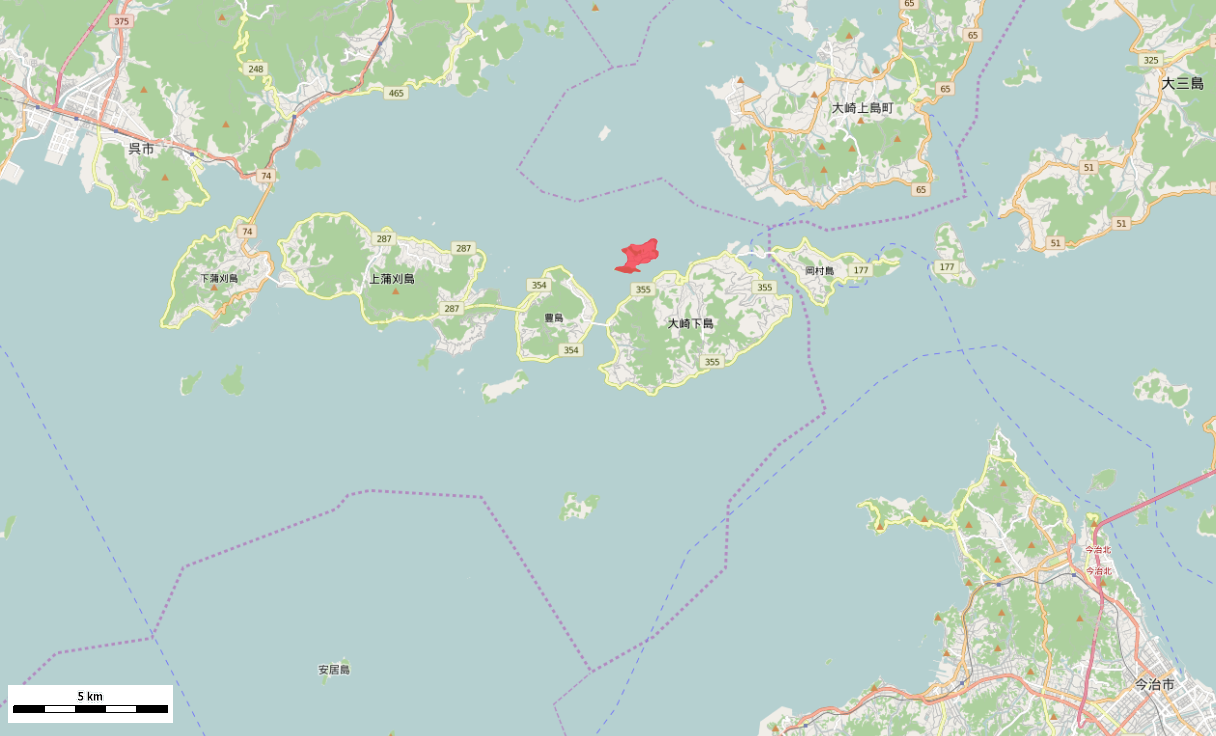 広島県呉市の三角島周辺 This map may be incomplete, and may contain errors. Don't rely solely on it for navigation.